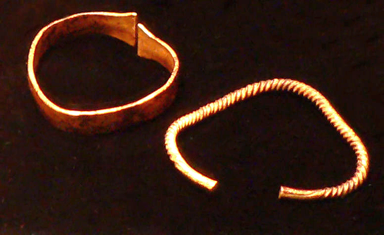 Armreif des Goldhort Gessel, präsentiert bei Pressekonferenz, Goldhort von Gessel, fotografiert im Niedersächsischen Landesamt für Denkmalpflege